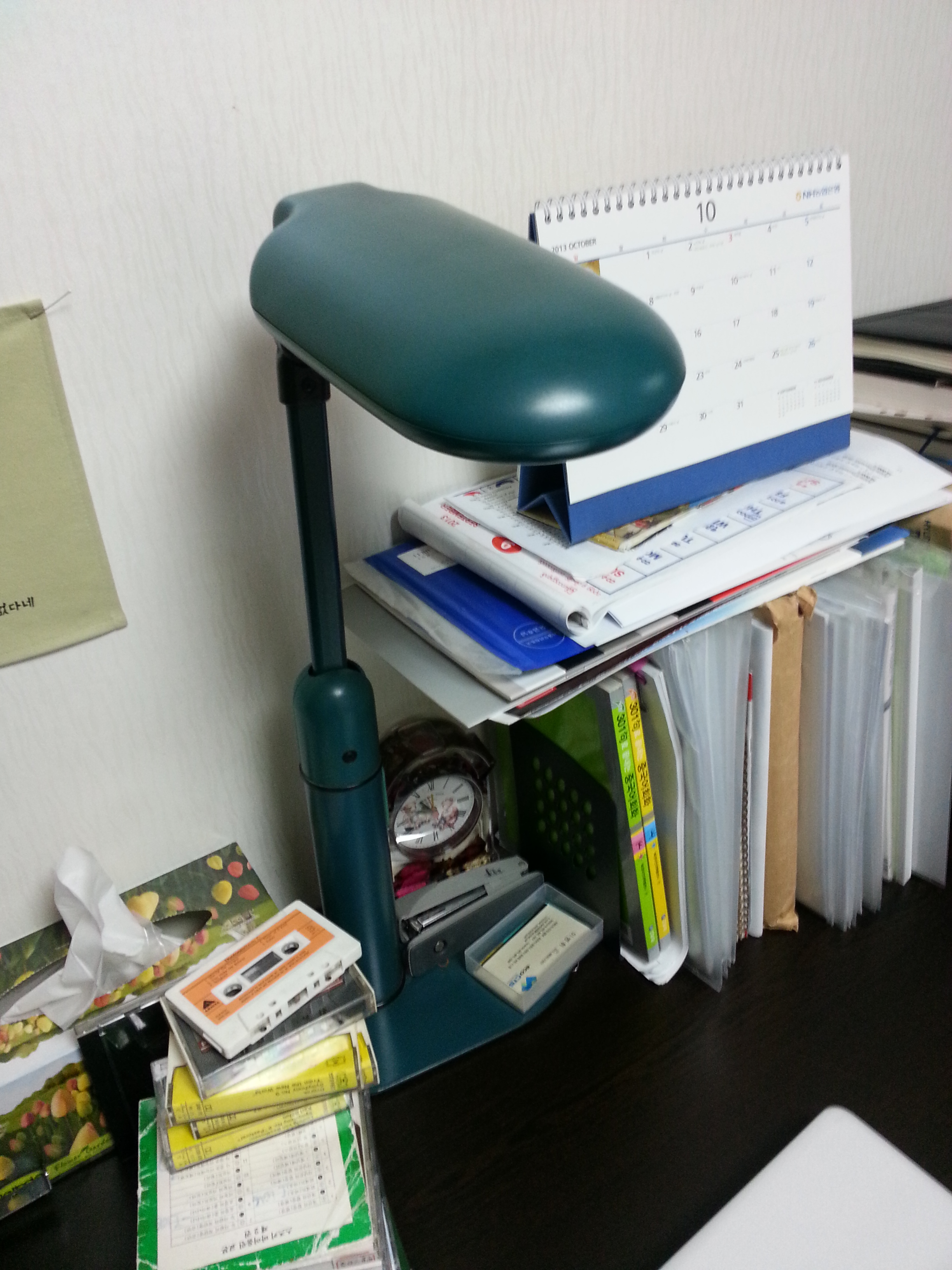 학습용 스탠드이다.